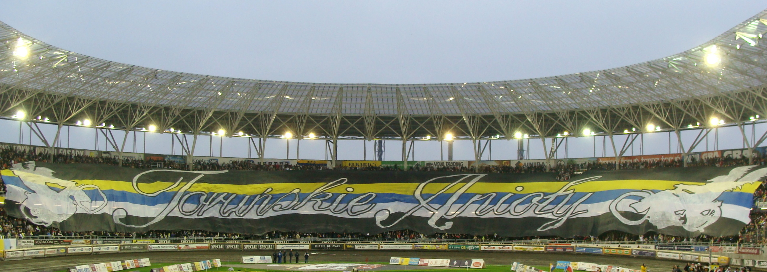 Sektorówka kibiców żużlowego Apatora Toruń ("Toruńskie Anioły") podczas finałowego meczu DMP 2009 przeciwko Falubazowi Zielona Góra, który odbył się 25.10.2009 r. na Motoarenie im. Mariana Rosego w Toruniu. Mecz zakończył się winikiem 40:38 dla drużyny gości.Wymiary flagi to 140 m x 20 m.